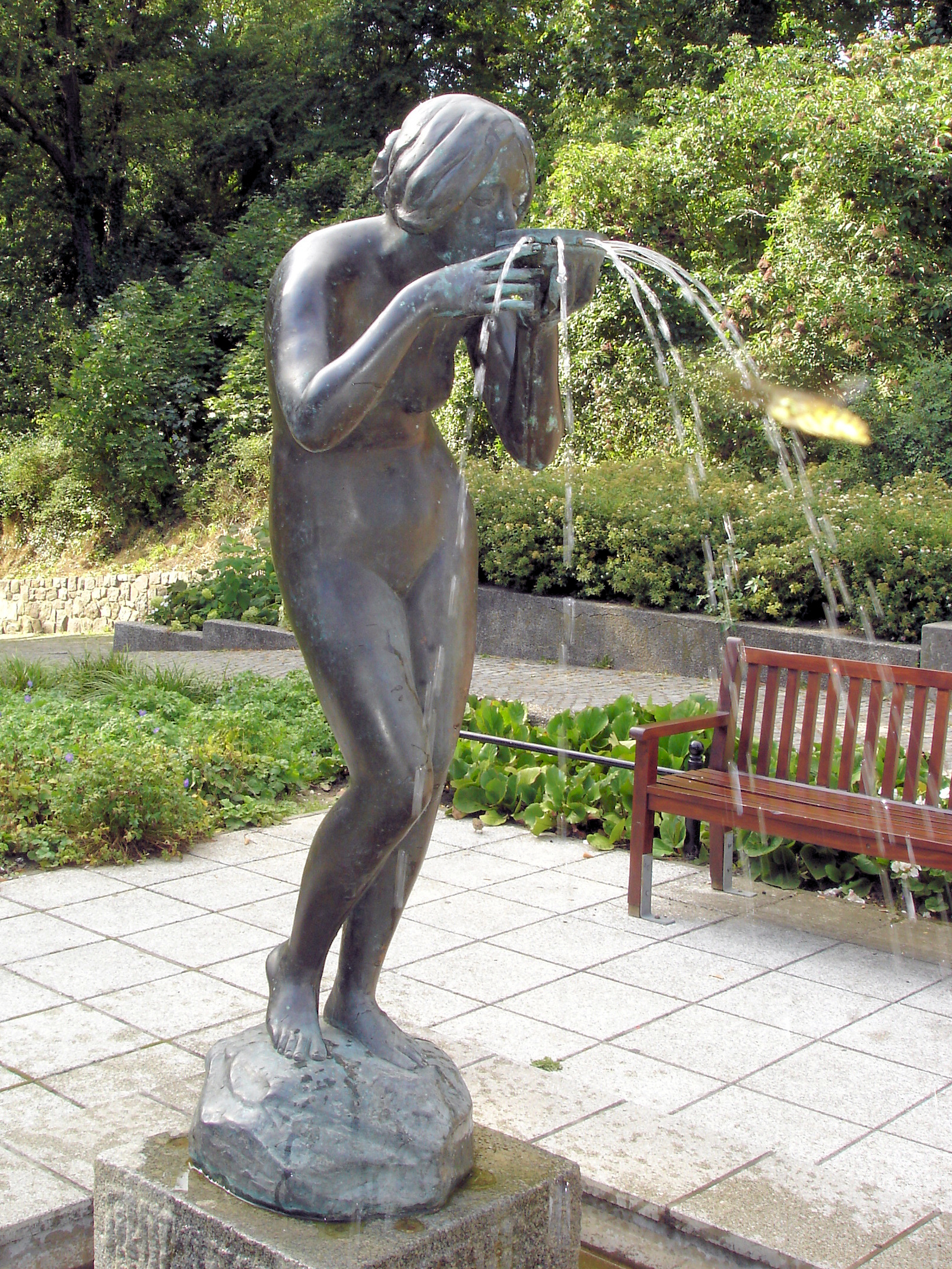 "Die Trinkende" in Rostock von Victor Seifert